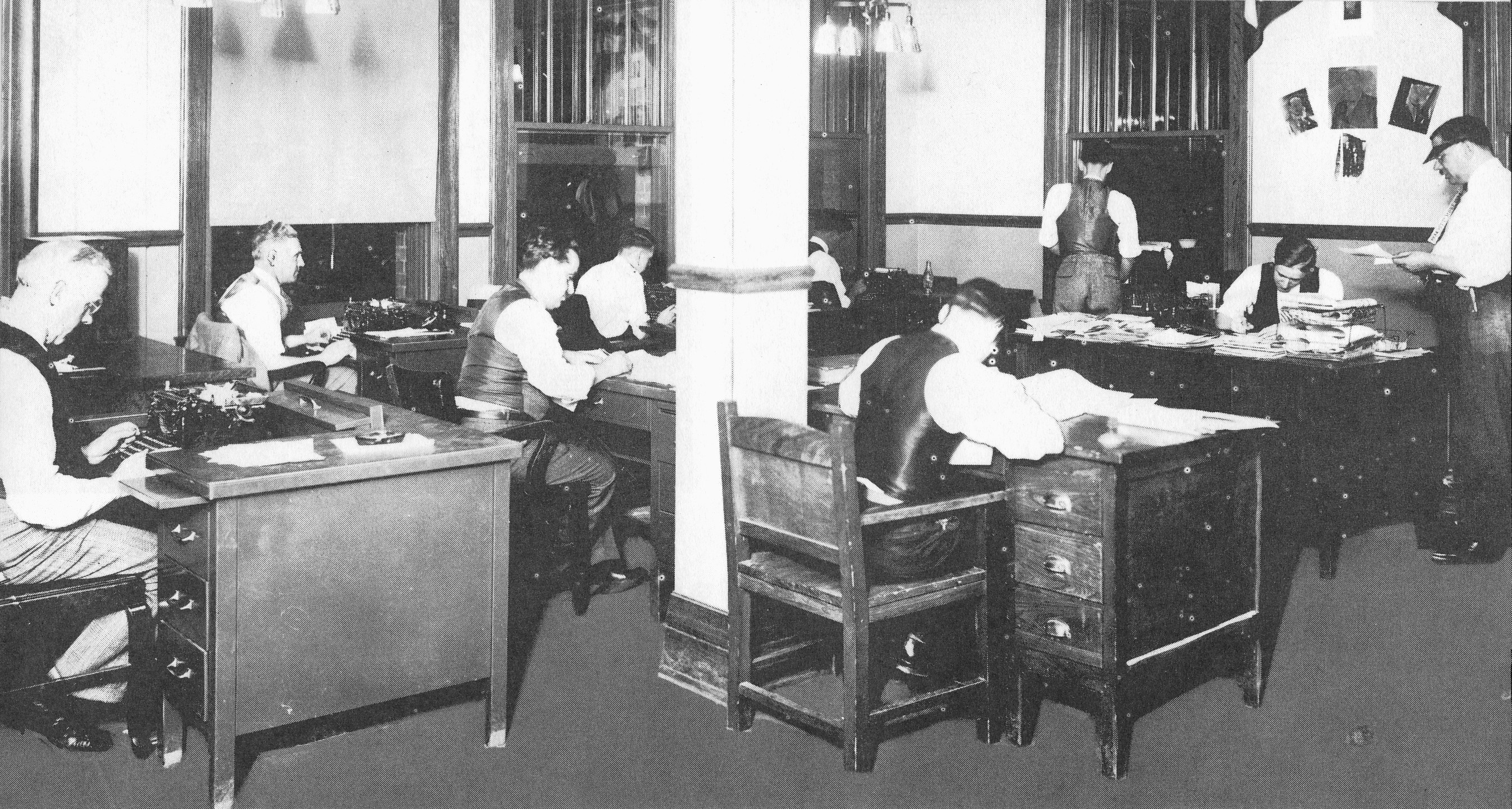 Salle de rédaction du journal L'Illustration, à Montréal (Québec, Canada). Dans la source ci-dessous, l'auteur Joseph Bourdon mentionne que cette photo aurait été prise «au temps de Louis Francœur», ce qui signifierait probablement vers 1934 ou 1935.